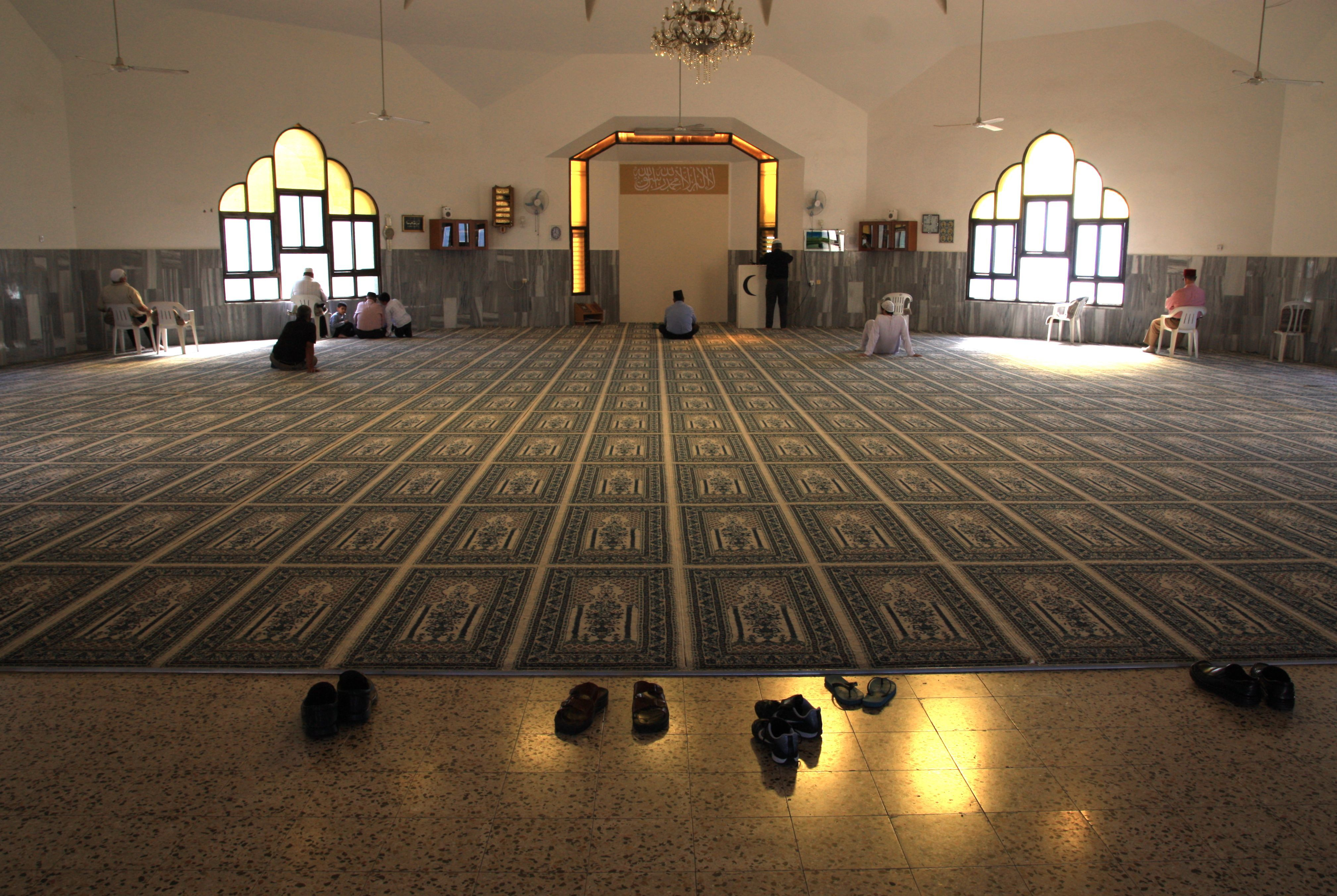 מסגד סיידנא מחמוד בשכונת כבביר בחיפה